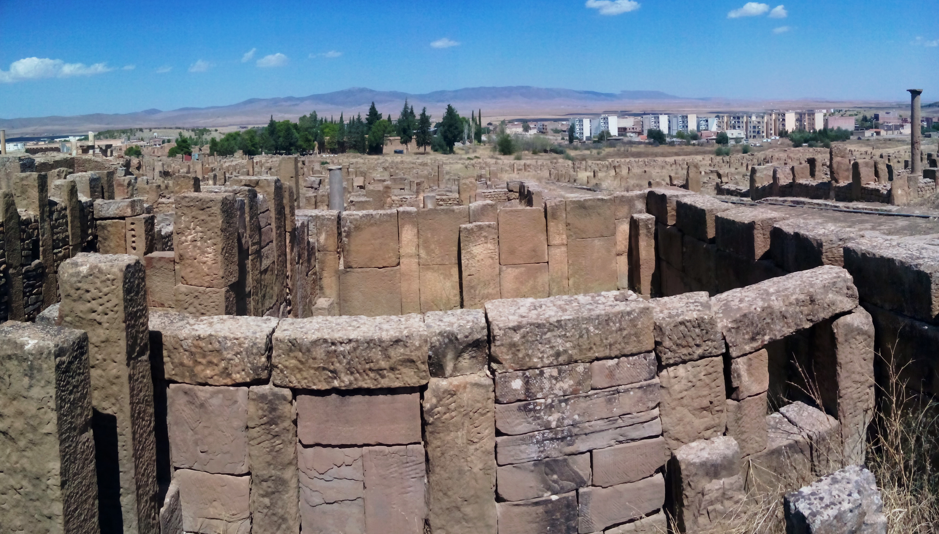 Territoires et monuments de l'antique Thamugadi.